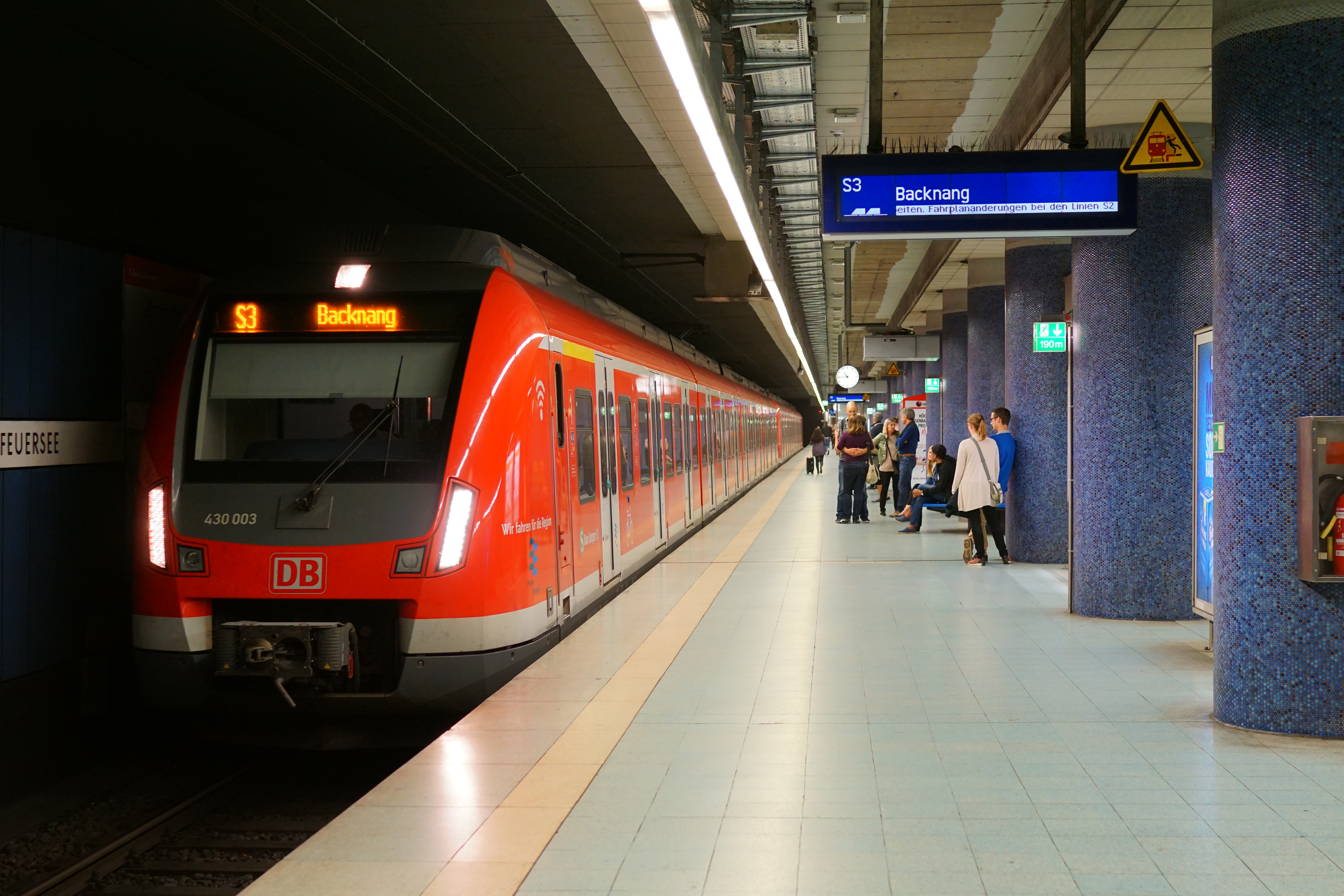 S-Bahn-Station Feuersee in Stuttgart